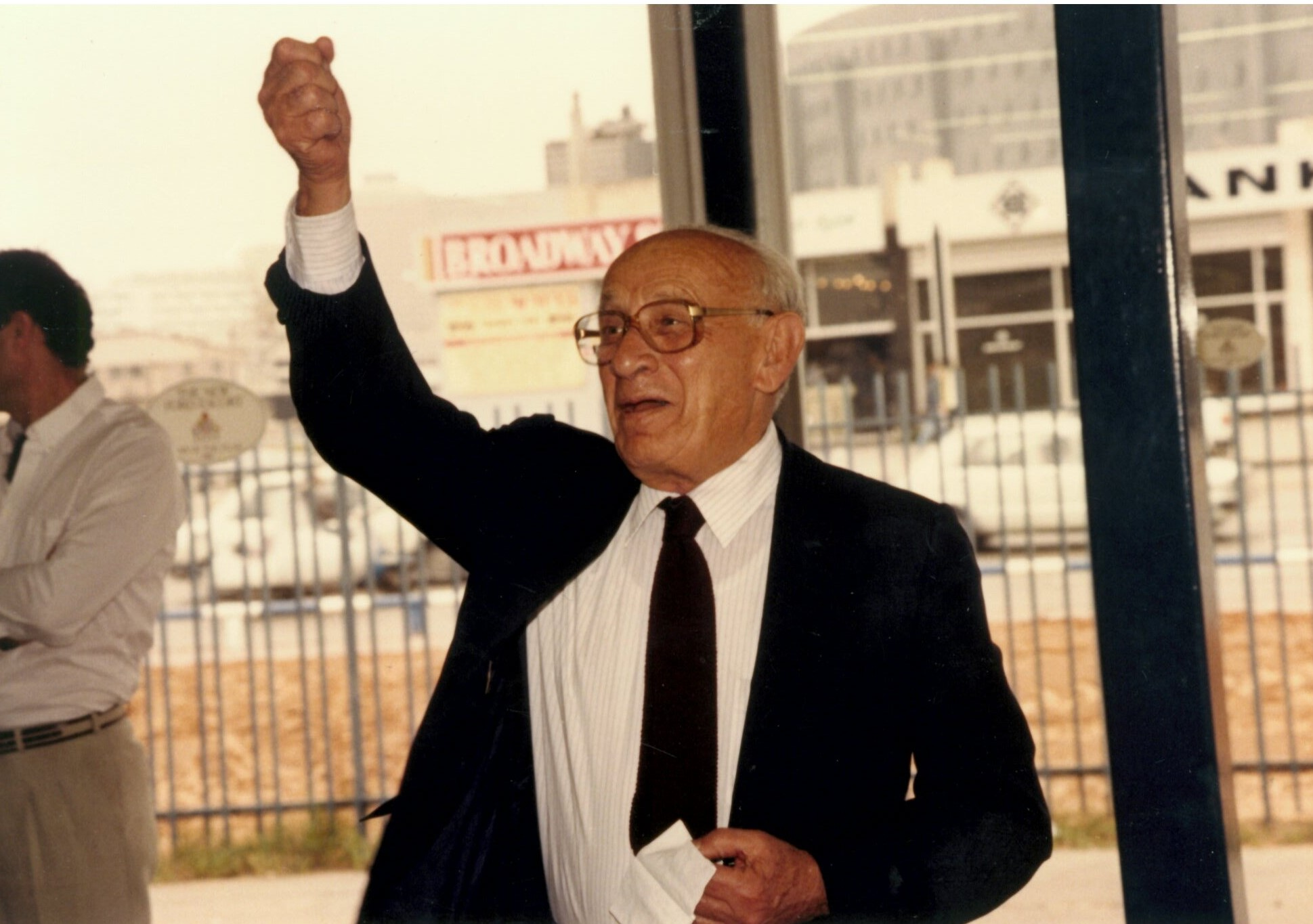 יוסף (ג׳ו) בוקסנבאום